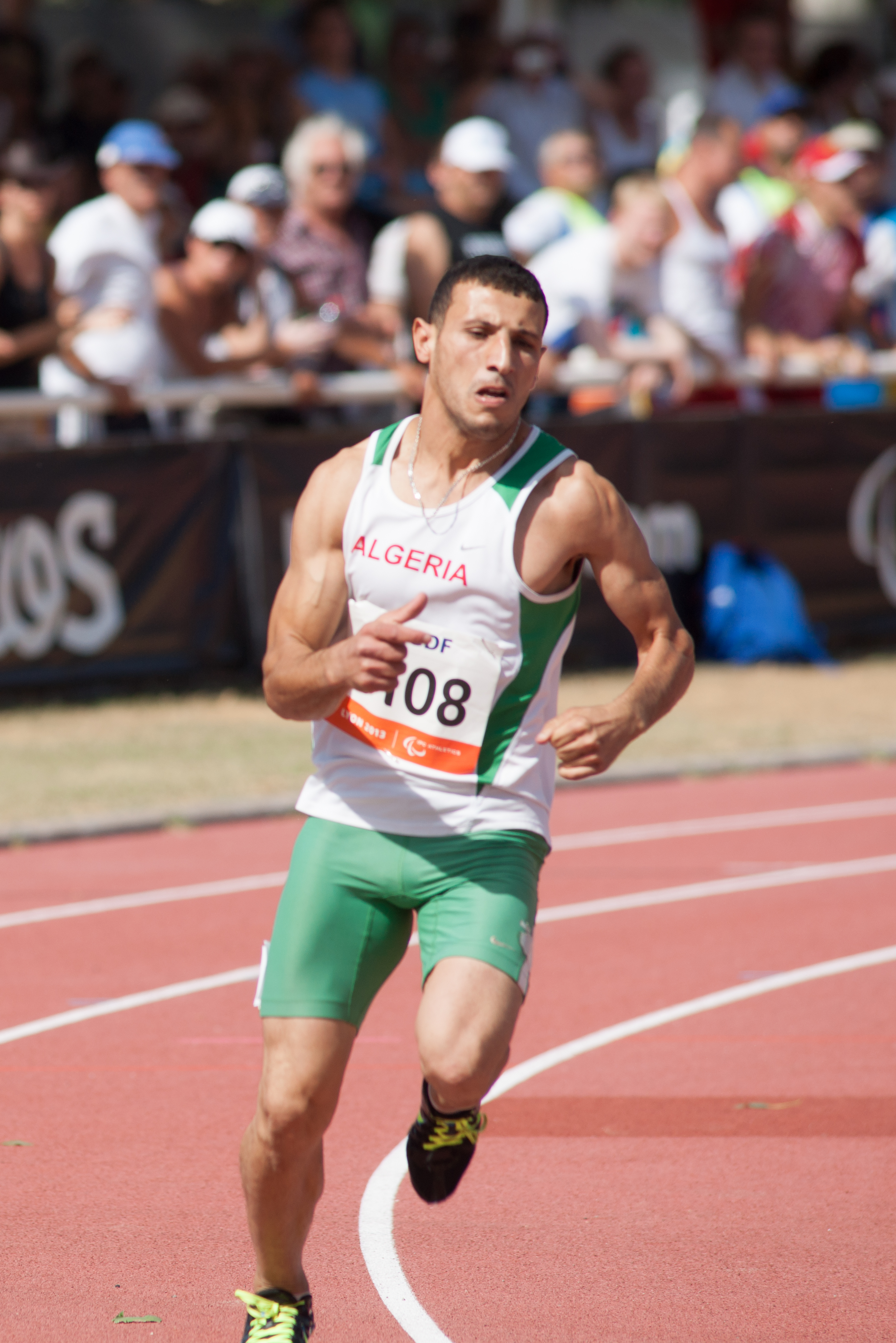 Championnats du monde d'athlétisme IPC 2013. 200 mètres masculin T35.